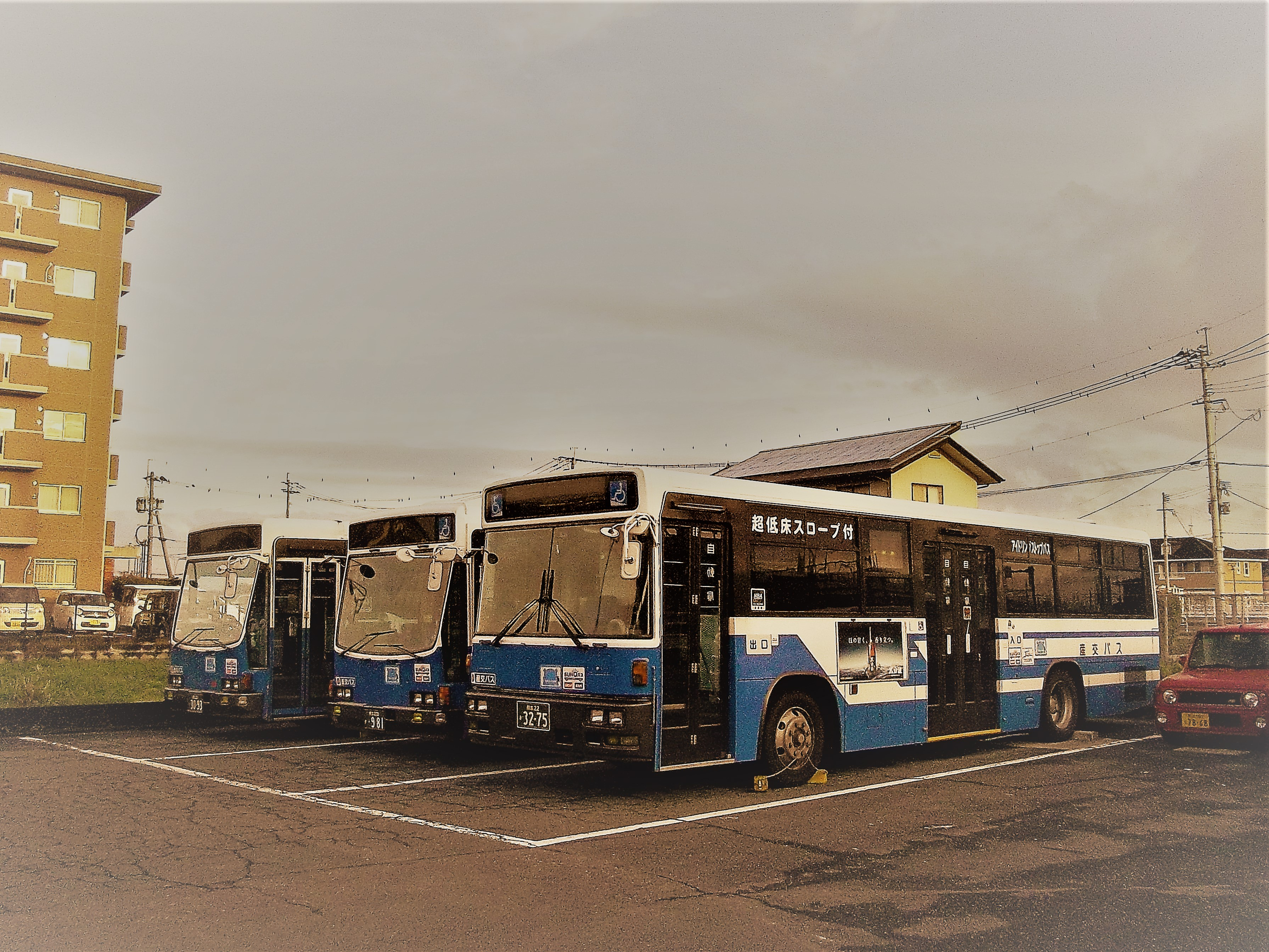 九州産交バス、熊本市南区にある国町駐車場